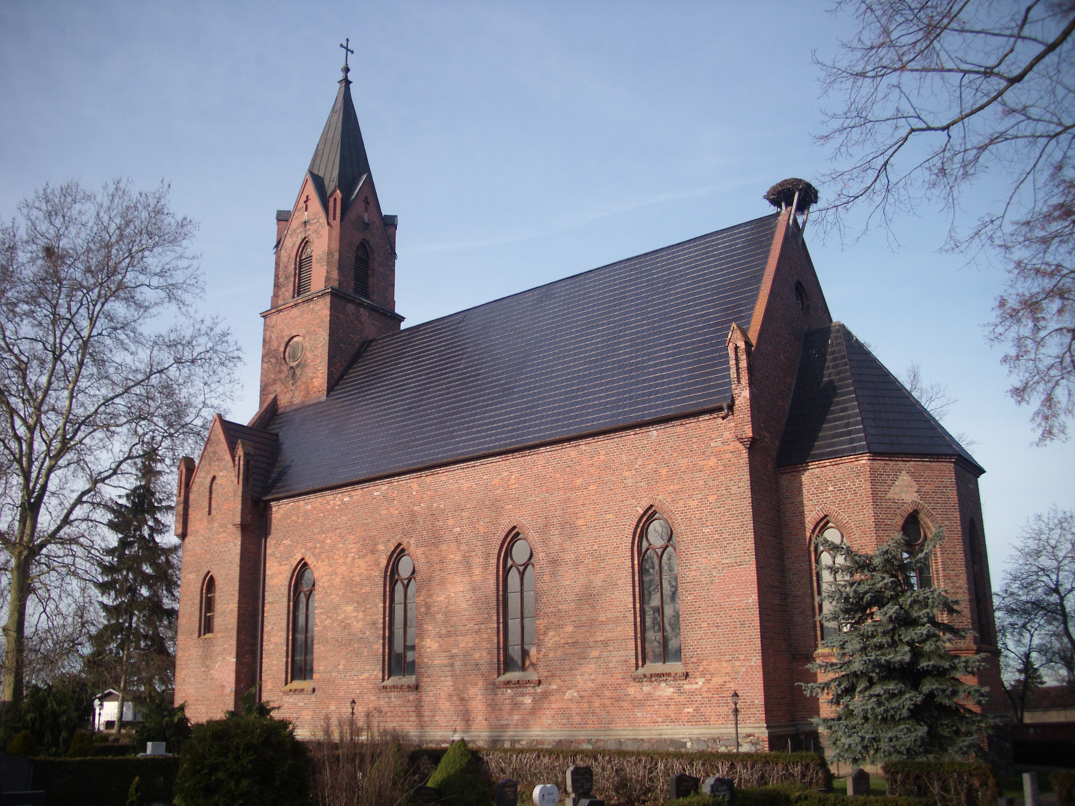 Kirche Treplin bei Booßen. This is a photograph of an architectural monument.It is on the list of cultural monuments of Treplin